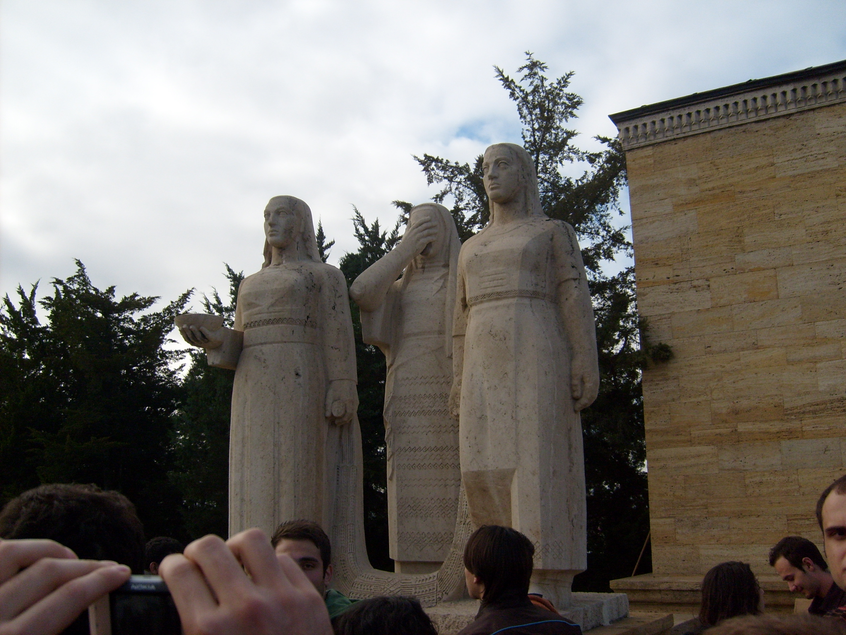 Aslanlı yol girişinde sağ taraftaki "Kadınlar Grubu" heykeli